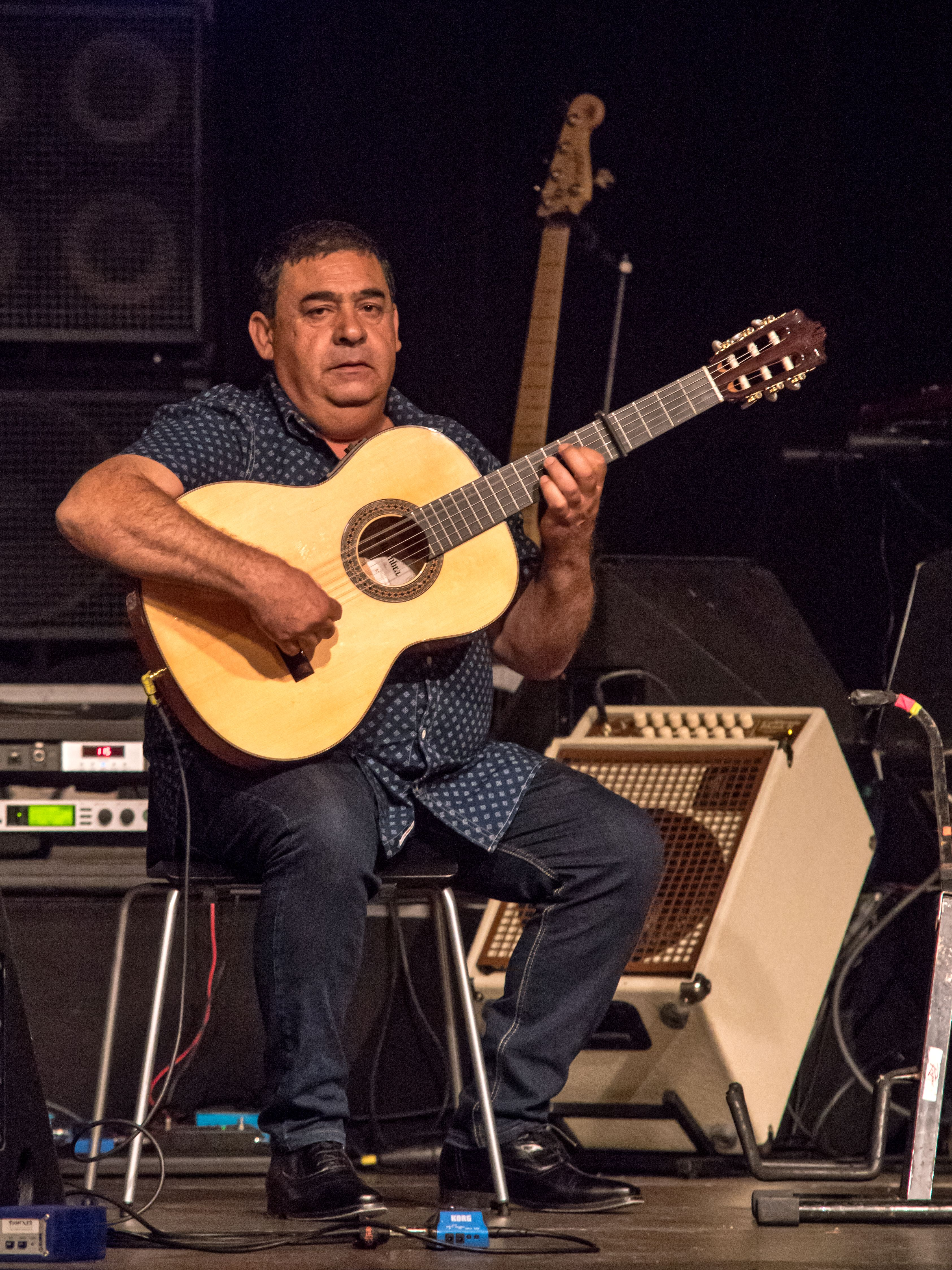 Bilder vom Zelt Musik Festival 2016 in Freiburg im Breisgau Gipsy Kings